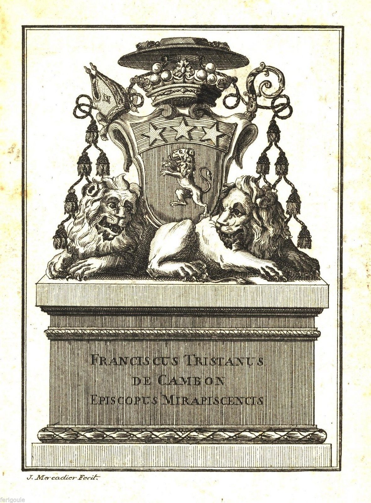 Ex libris de Mgr Tristán de Cambón, dernier évêque de Mirepoix de 1768 à 1790.